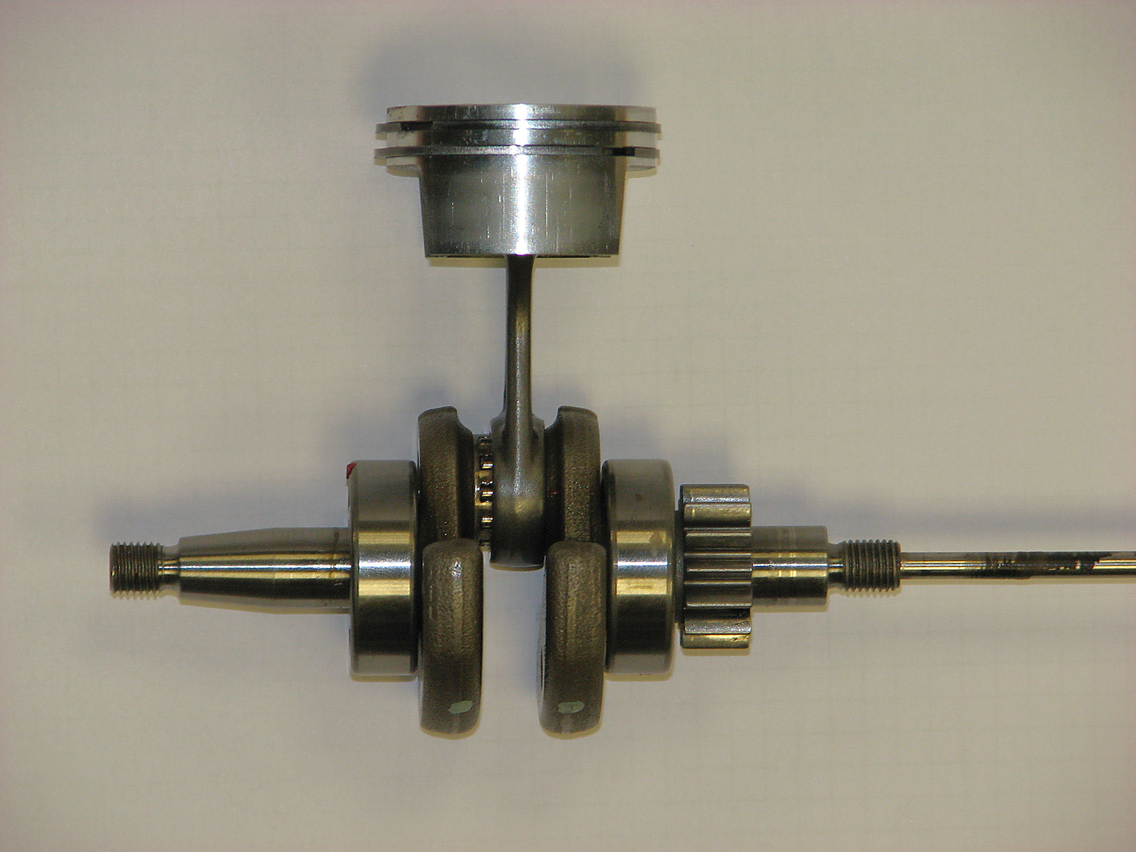 Kurbeltrieb eines 35ccm Viertakt-Motors der Firma Stihl mit gebauter Kurbelwelle